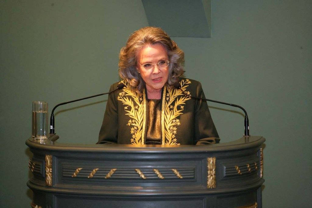 Posse da escritora Rosiska Darcy de Oliveira na Cadeira Número 10 da ABL. 14.06.2013 [migre.me/f3HJd] Foto: Pércio Campos